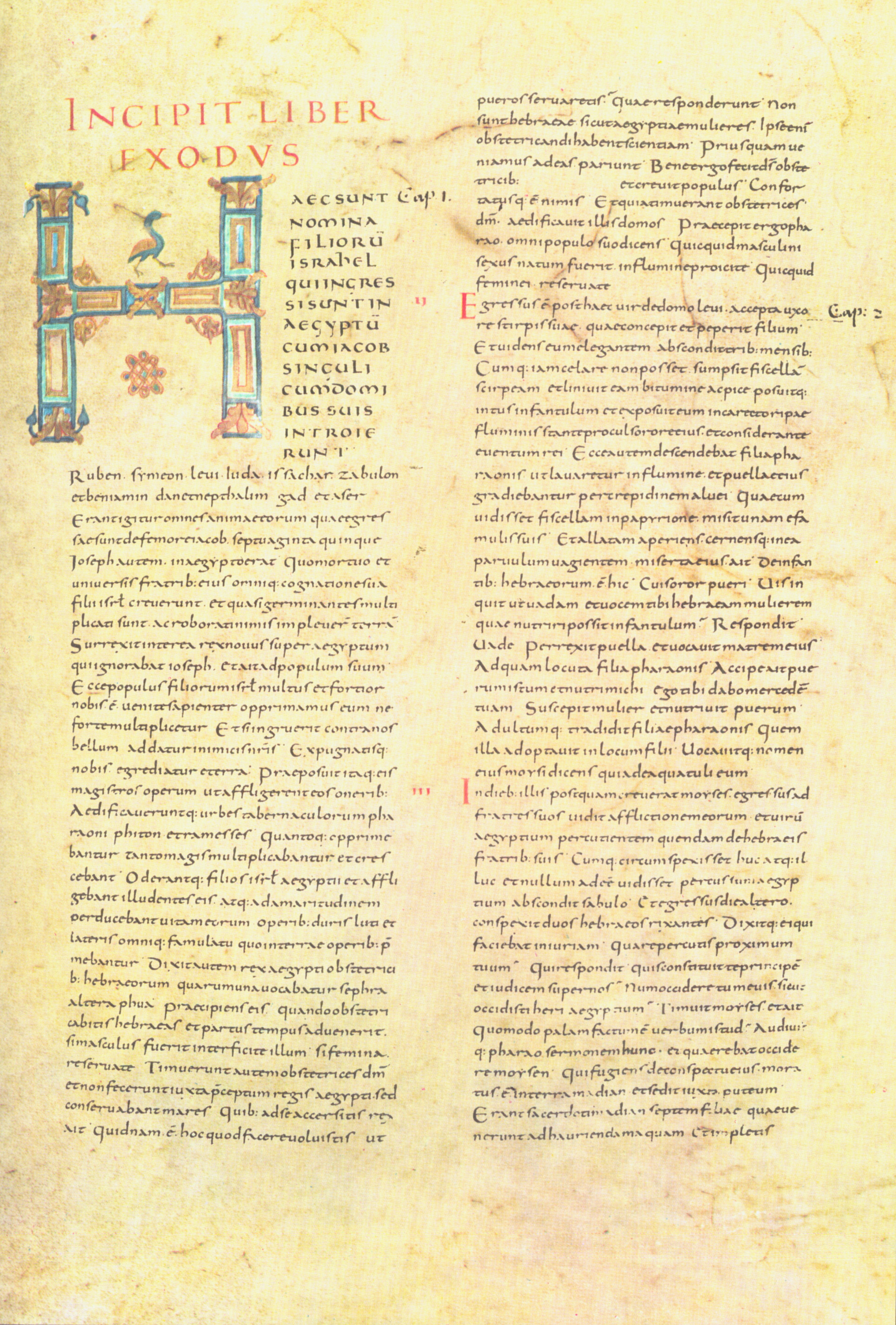 Illustrierte Handschrift von Alkuins Bibeltext um 840 in Tours entstanden, in karolingischen Minuskeln